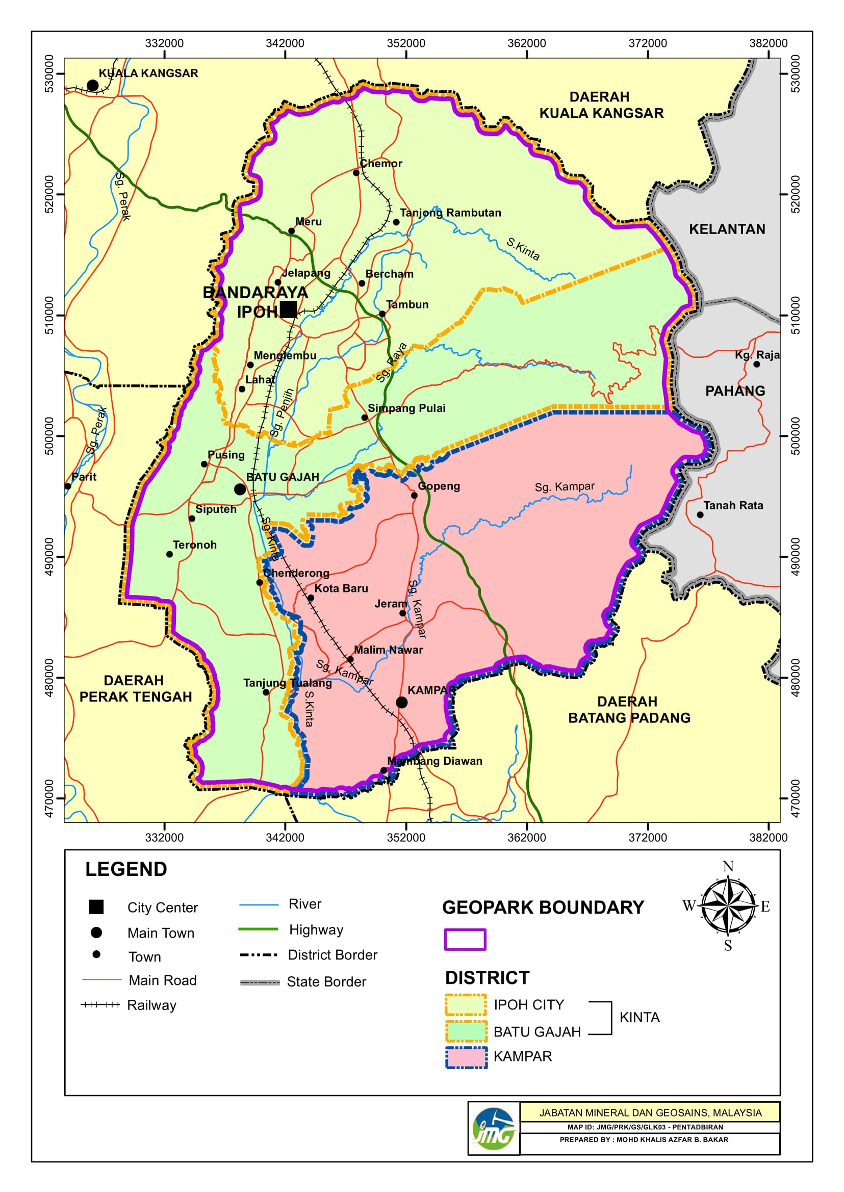 3 kawasan majlis